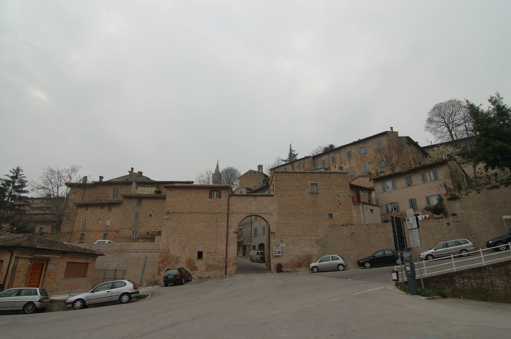 Urbino, Marche, Italia